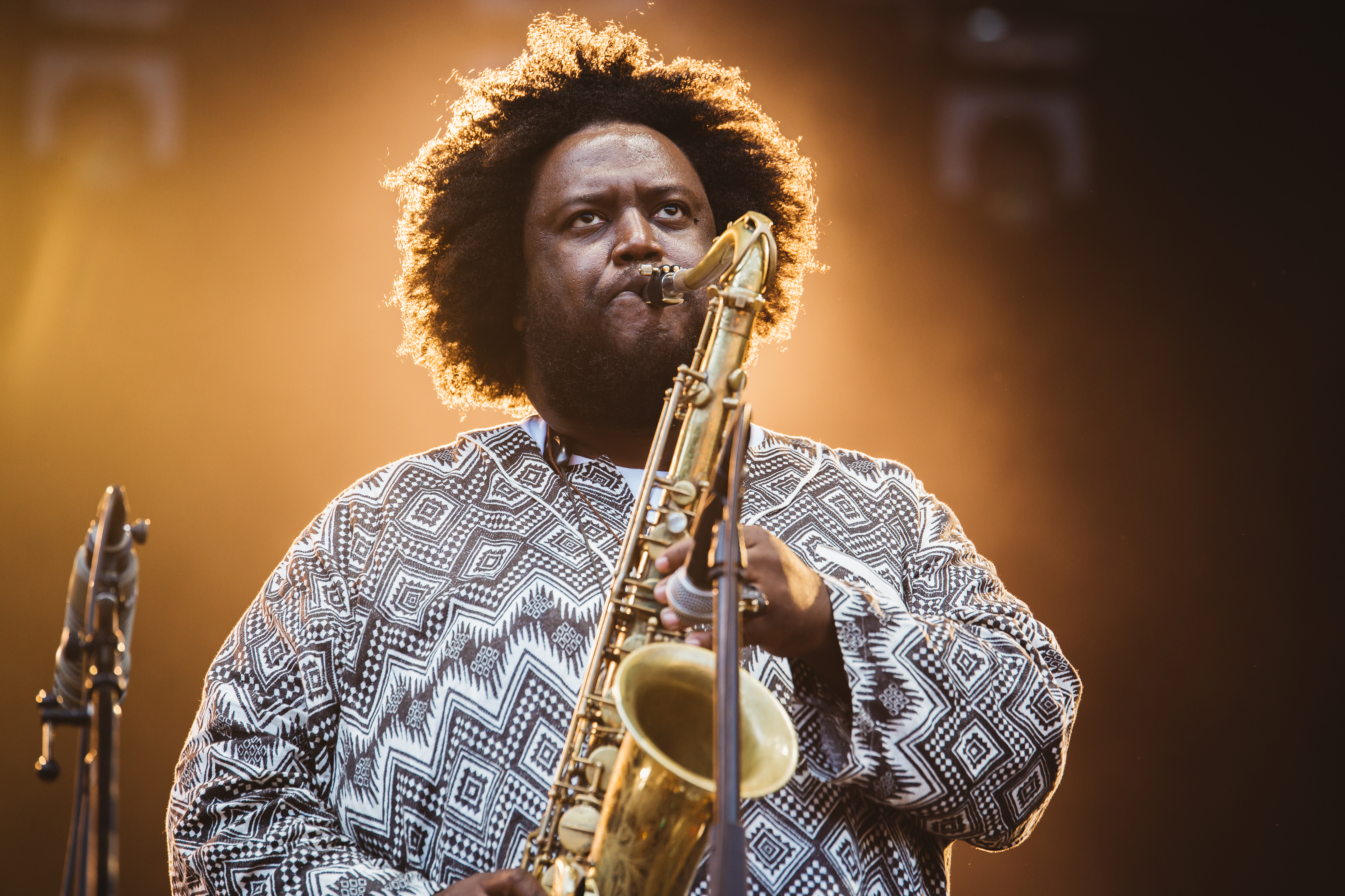 Photo: Krists Luhaers // @Kristsll